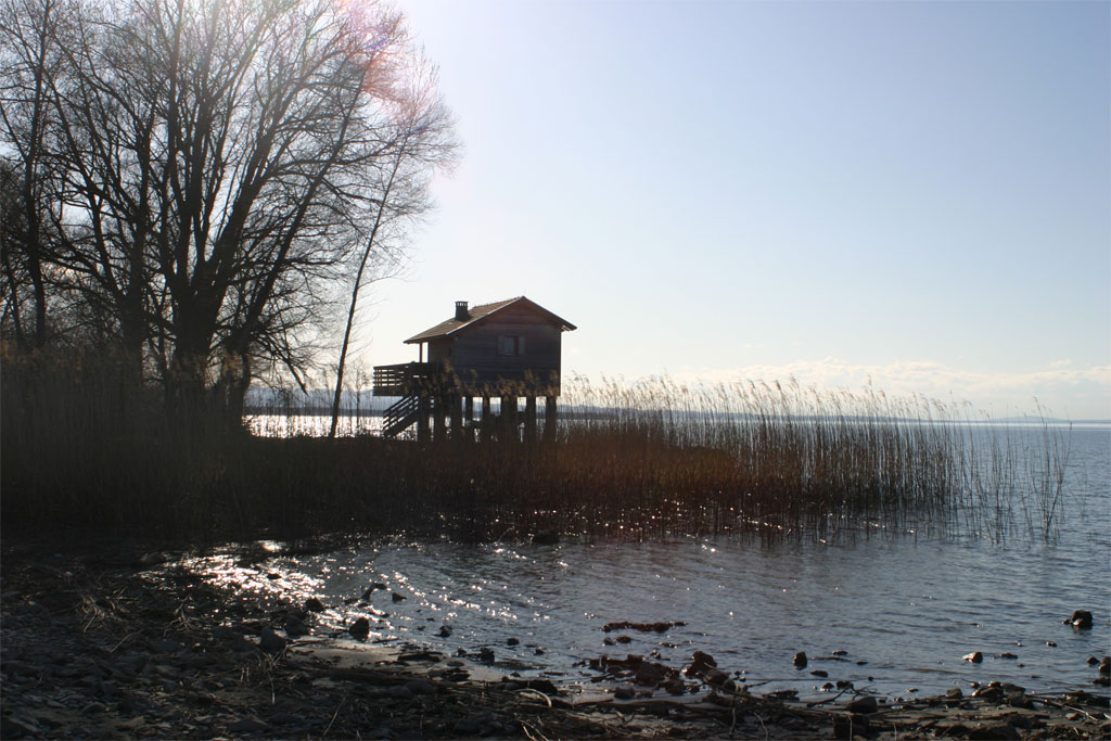 Naturschutzgebiet Rheindelta, Hütte am Rohrspitz, Fußach